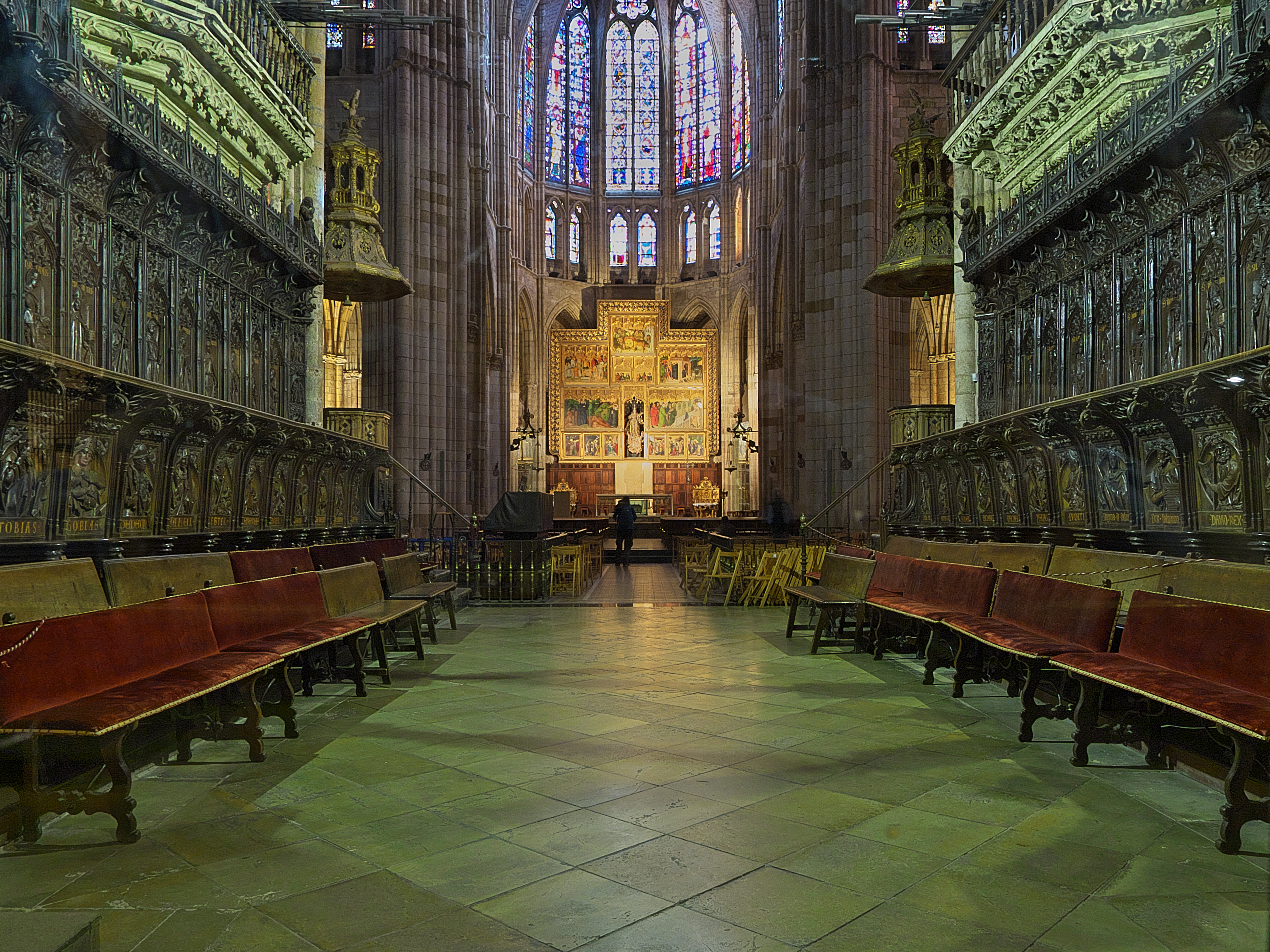 Presbiterio desde el coro catedralicio.